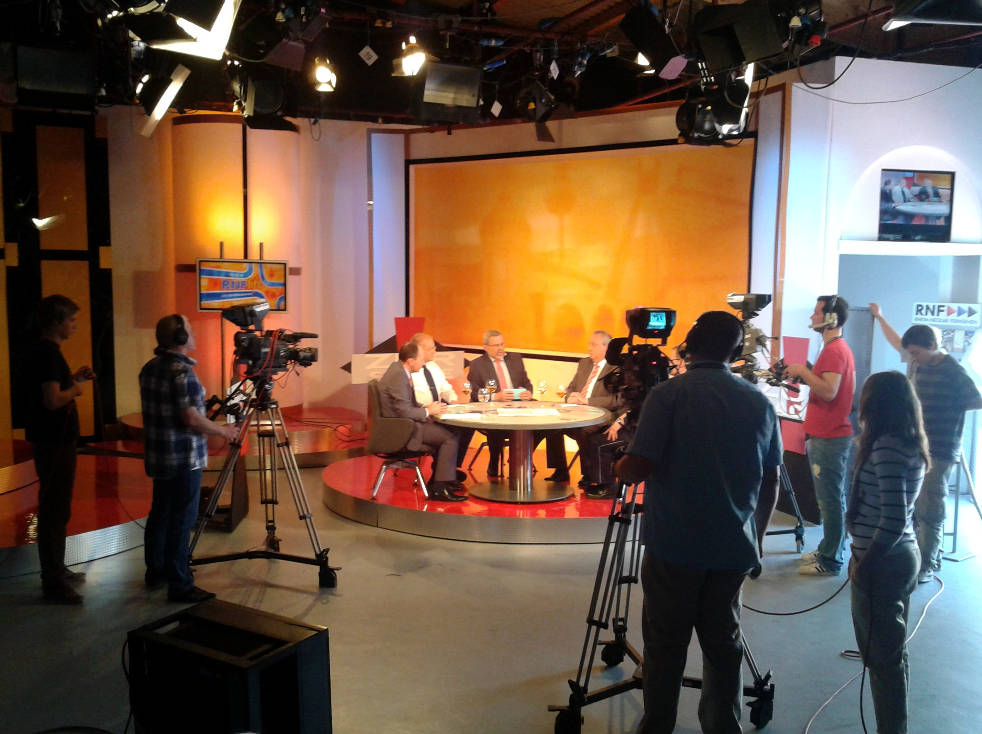 Fernsehübertragung der Sendung "Zur Sache" vom Rhein-Neckar-Fernsehen auf dem Mannheimer Maimarkt